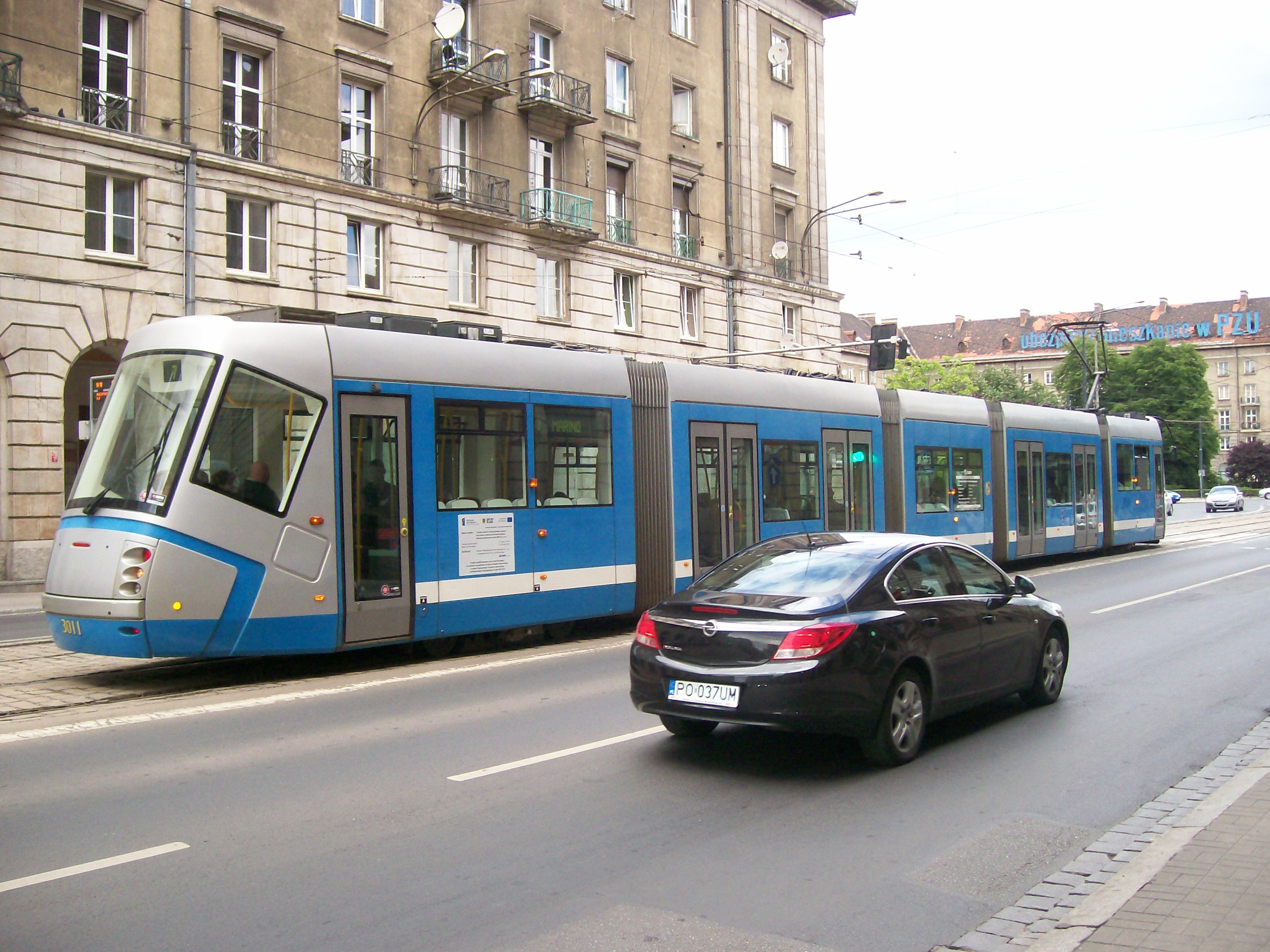 Škoda 16 T we Wrocławiu, 2014